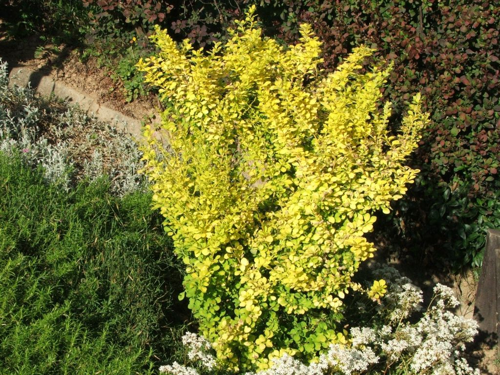 Berberis thunbergii (pl. Berberys Thunberga)